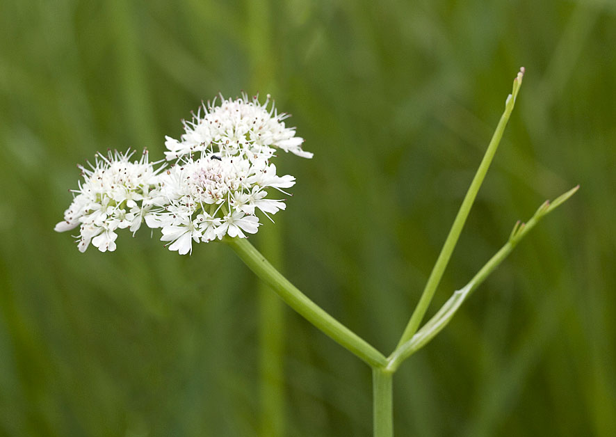 Oenanthe fistulosa, inflorescence